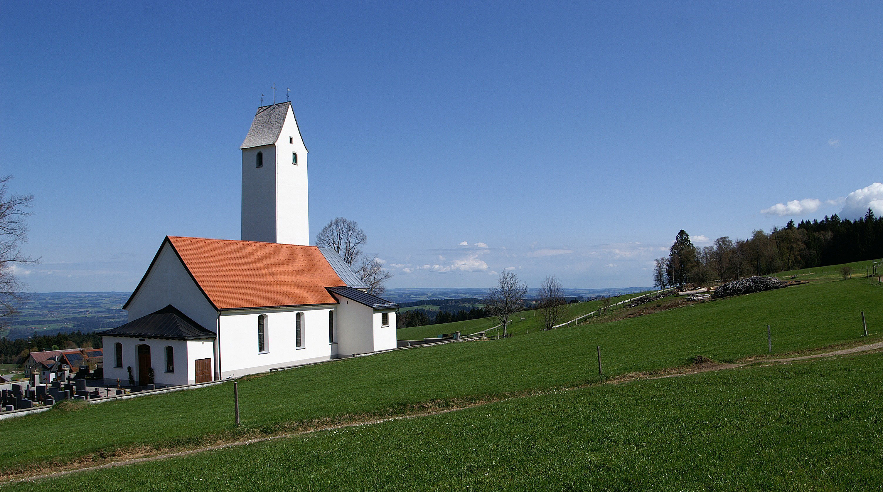 Pfarrkirche hl. Ulrich von Möggers in Vorarlberg von Süden.